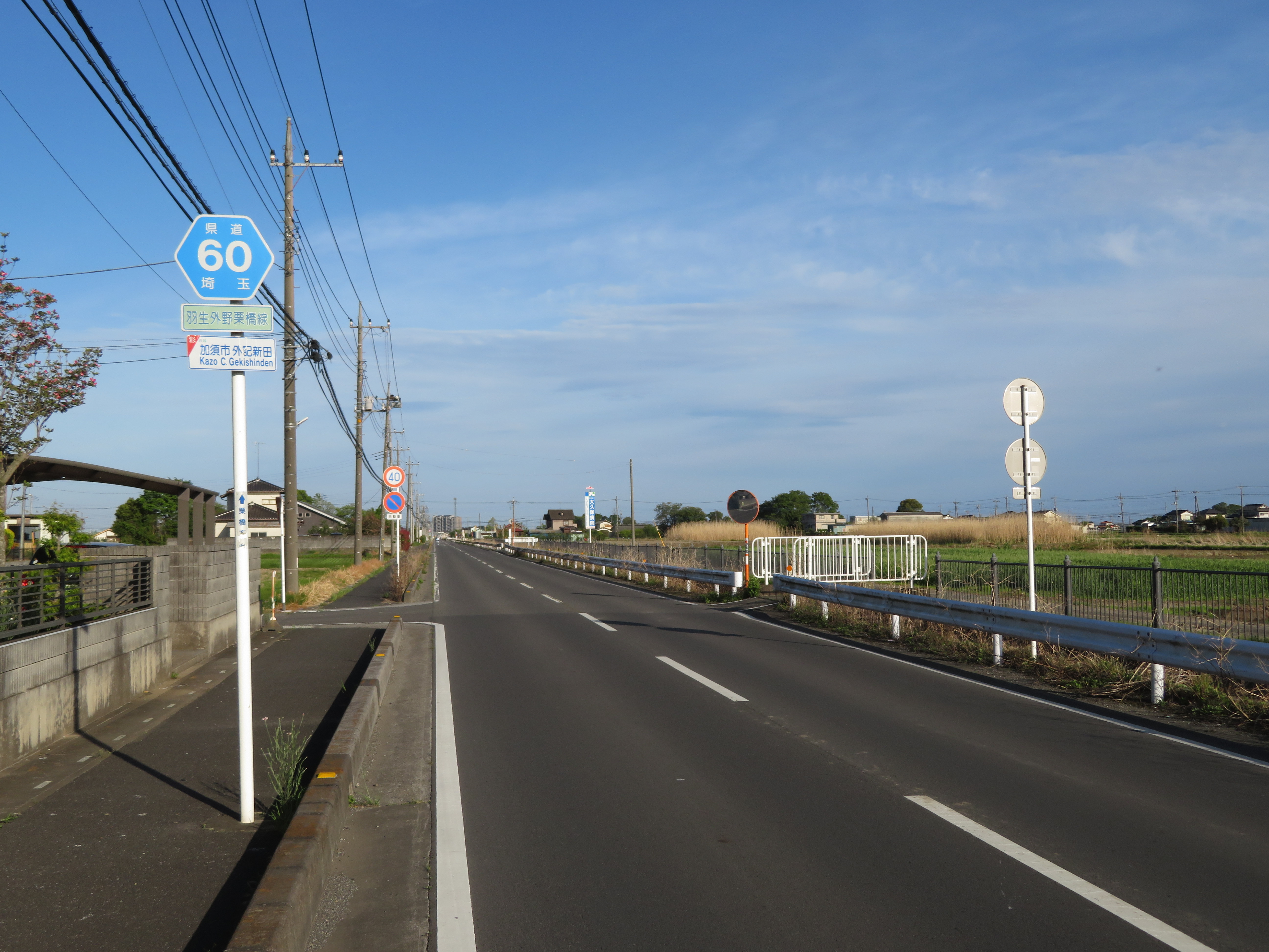 埼玉県道60号線 加須市外記新田付近（栗橋方面を撮影） Canon PowerShot SX720 HS